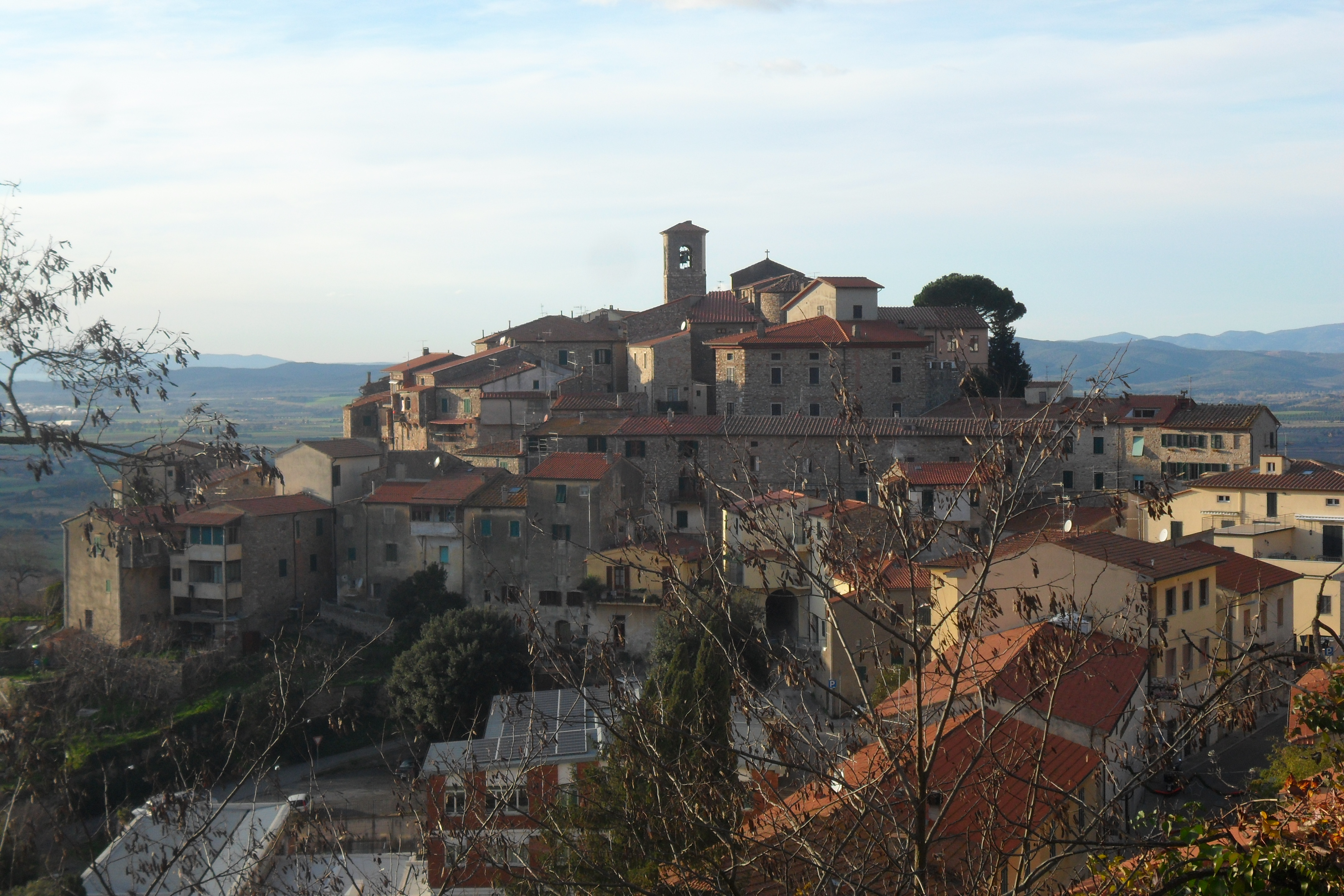 Panorama Gavorrano